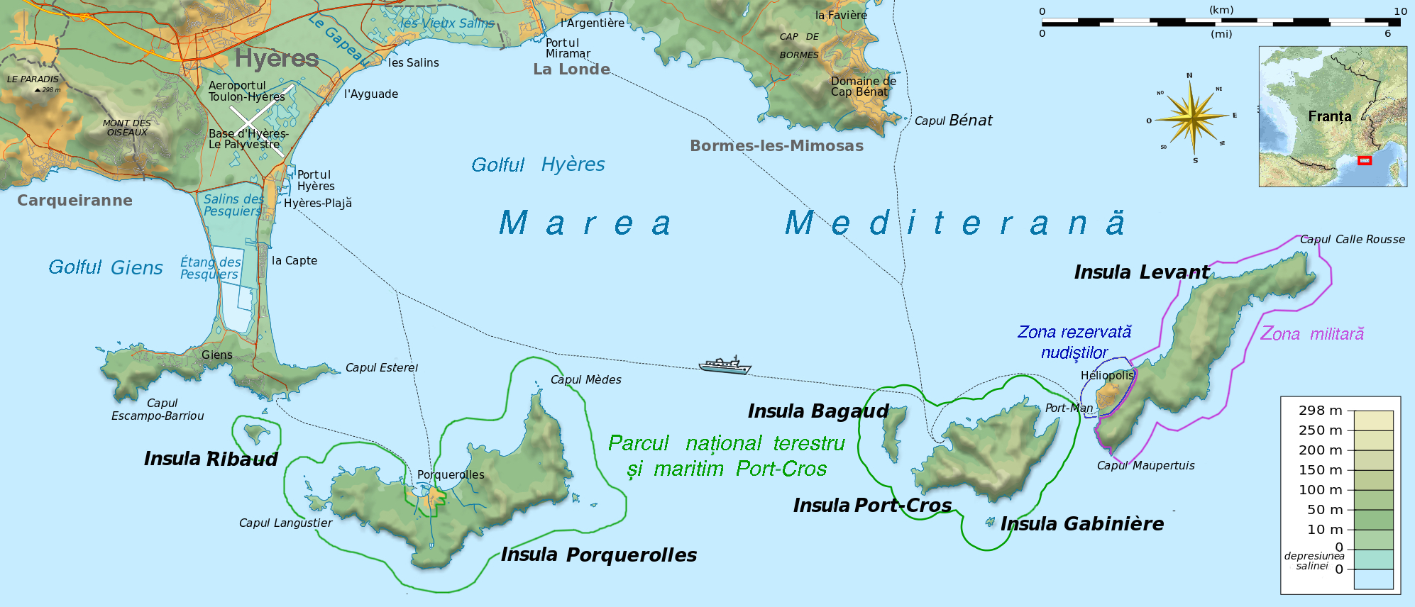 Harta Parcului natural Port-Cros (Franța) actualizată 2016